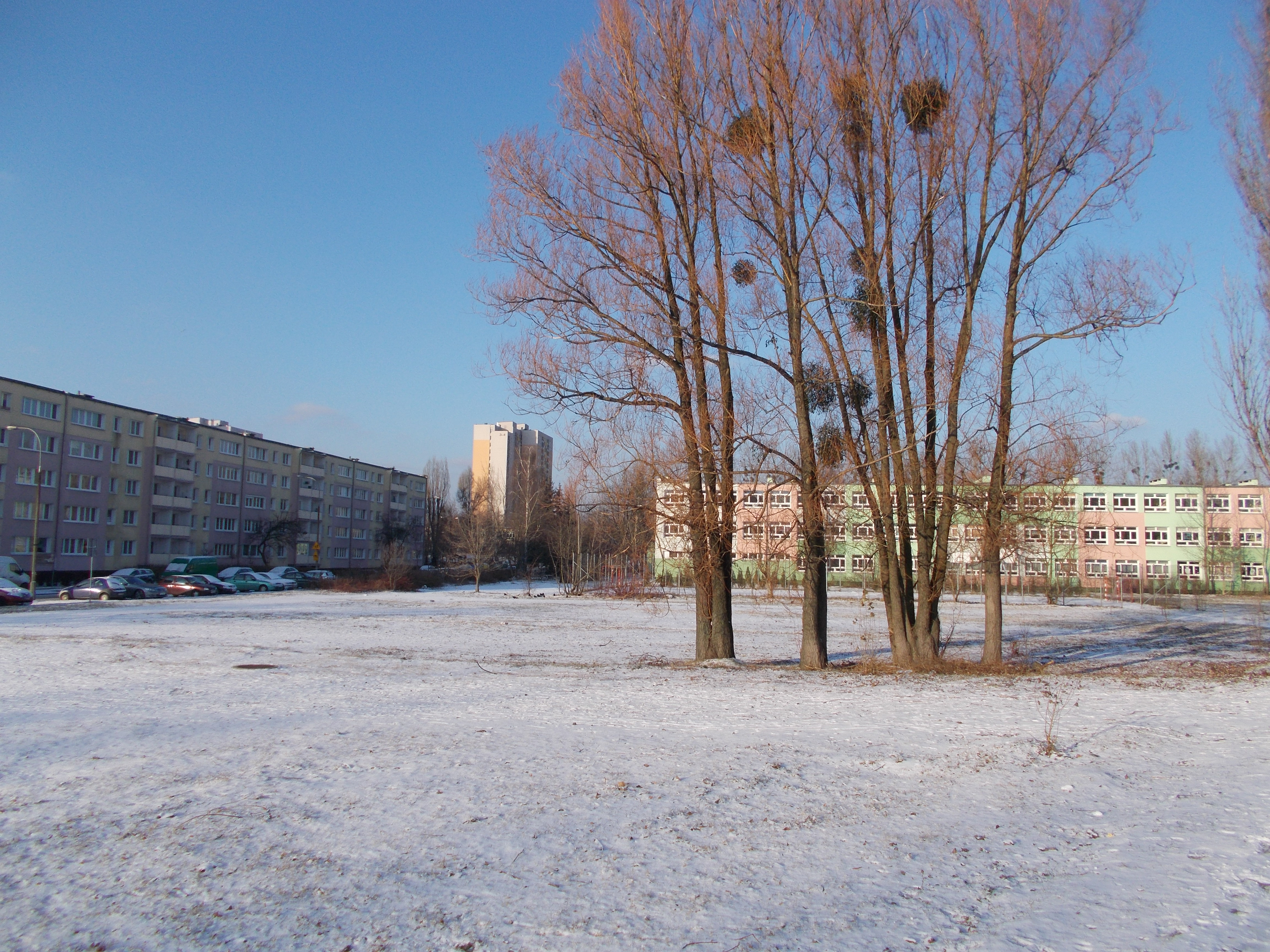 Osiedle Rzeczypospolitej w Poznaniu.Widok na blok mieszkalny i Liceum Ogólnokształcące nr 10.